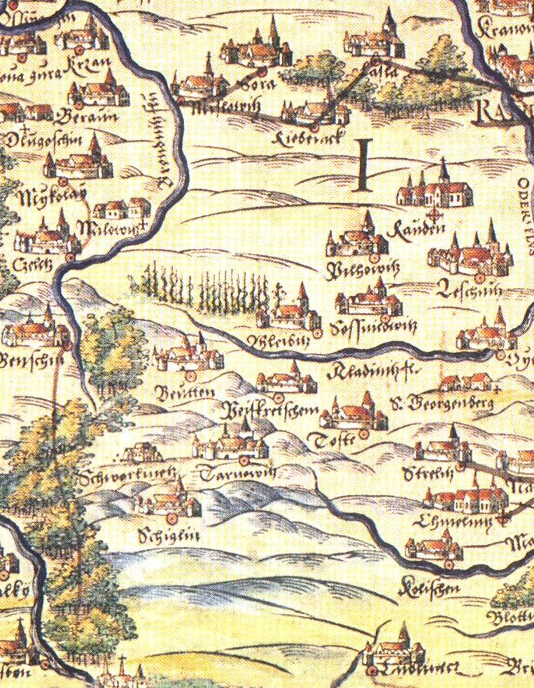 Wschodnia część Górnego Śląska z Tarnowskimi Górami i okolicą wg mapy Helwiga z XVI w.